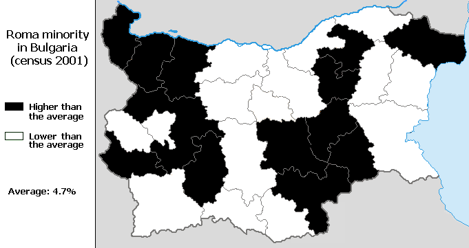 Roma minority in Bulgaria